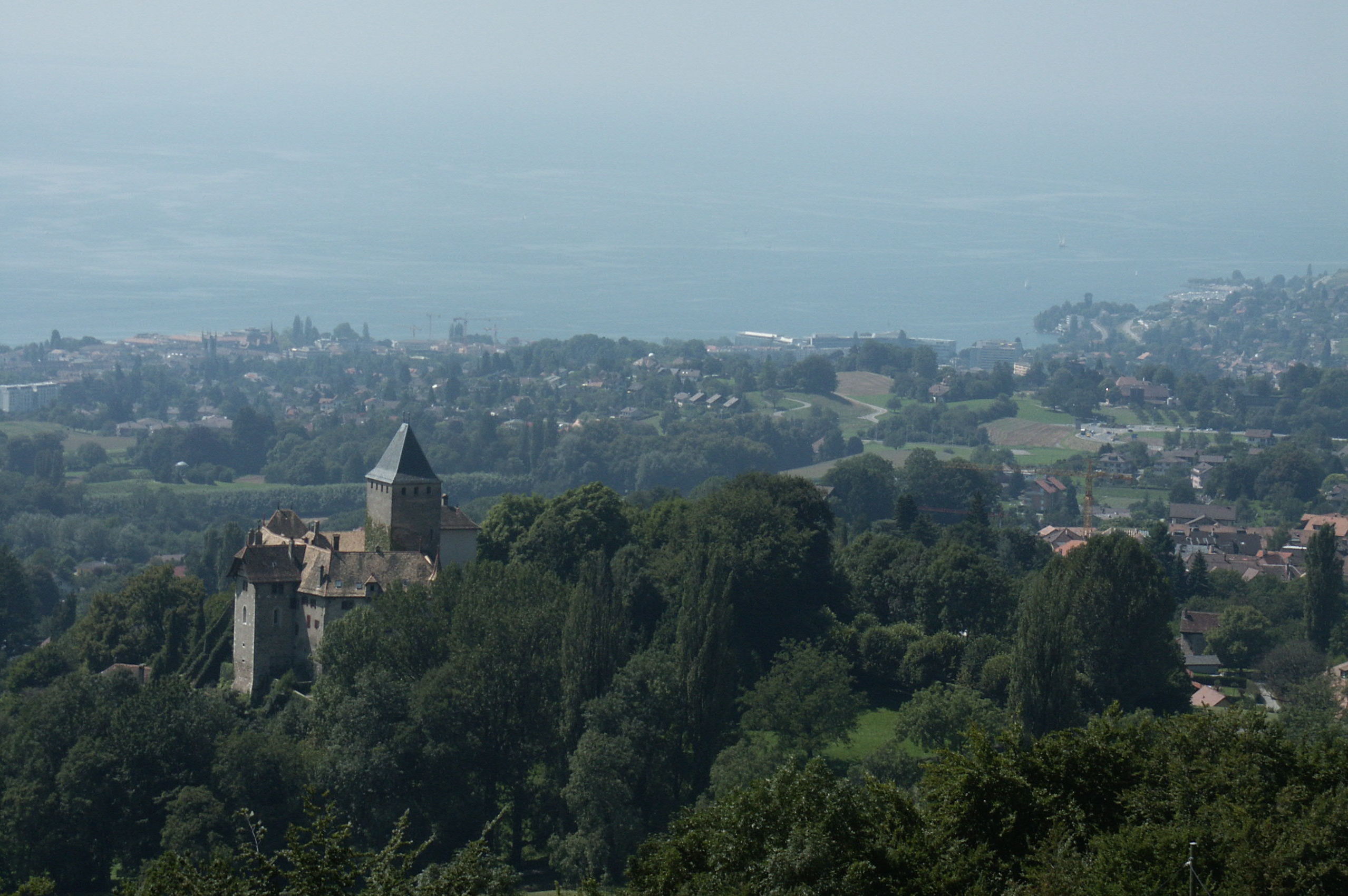 Chateau de Blonay mit Blick auf Vevey